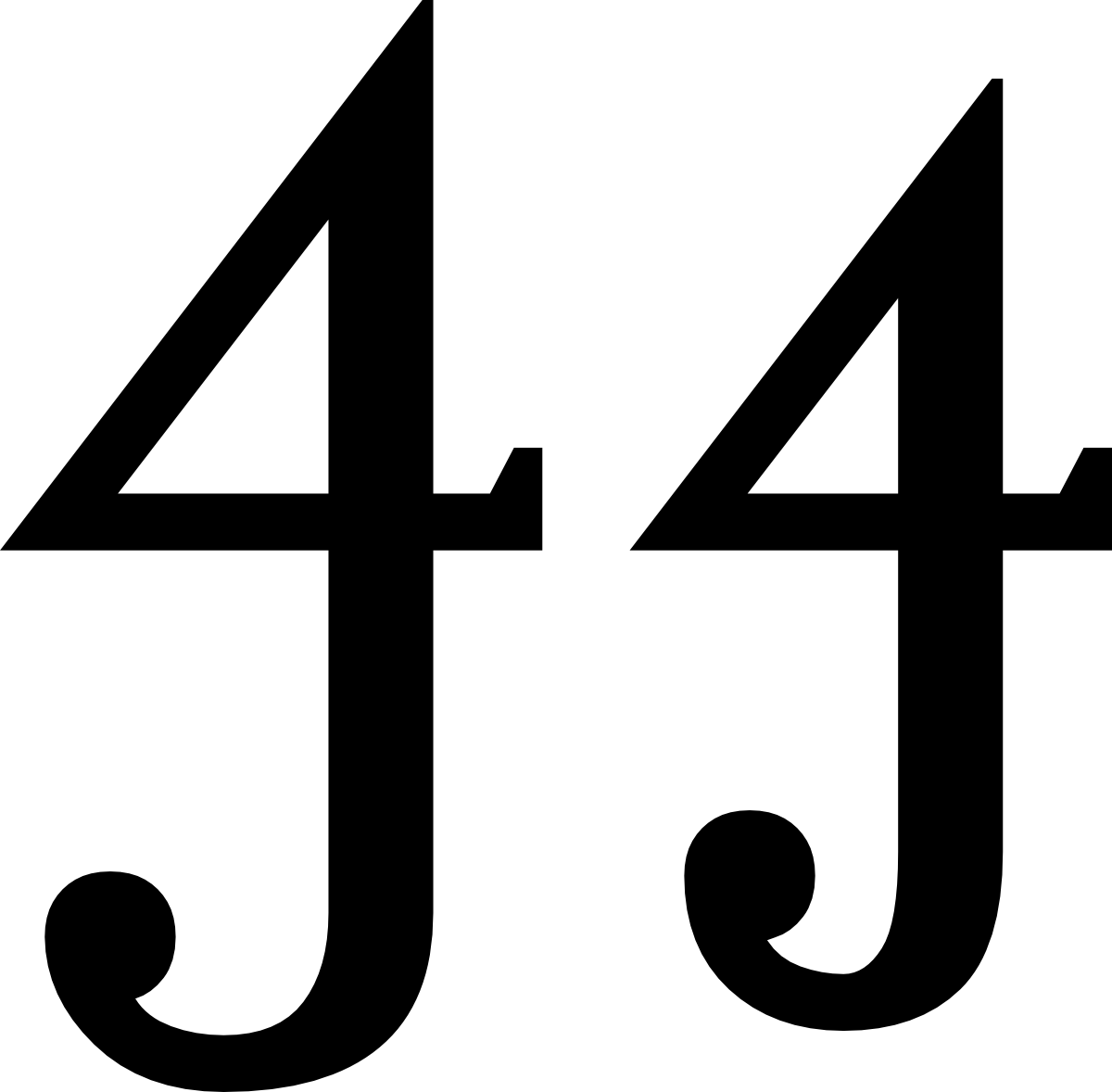 Cuatrillo (Ꜭ, ꜭ)